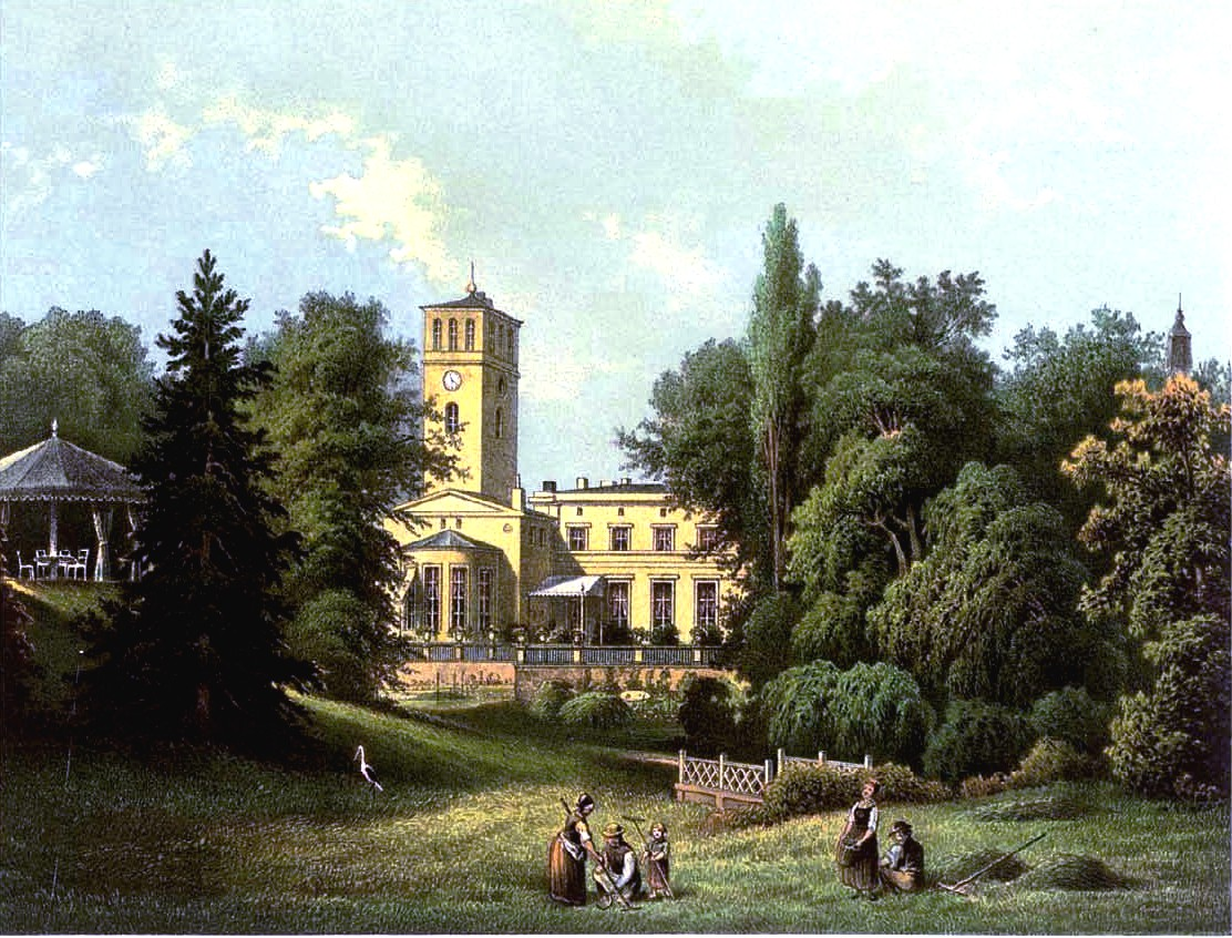 Schloss Blumberg, Kreis Nieder-Barnim, Lithographie von Alexander Duncker